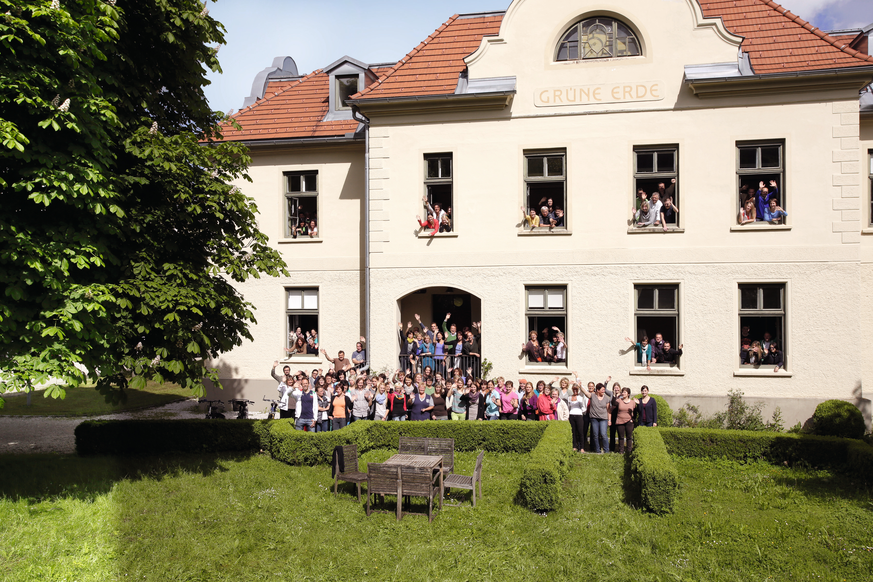 Die Unternehmenszentrale von Grüne Erde im Schraubenhaus genannten Wohnhaus der Redtenbacher Sensenwerke in Scharnstein